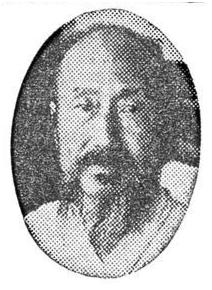 Yun Tchi-ho's 1930.